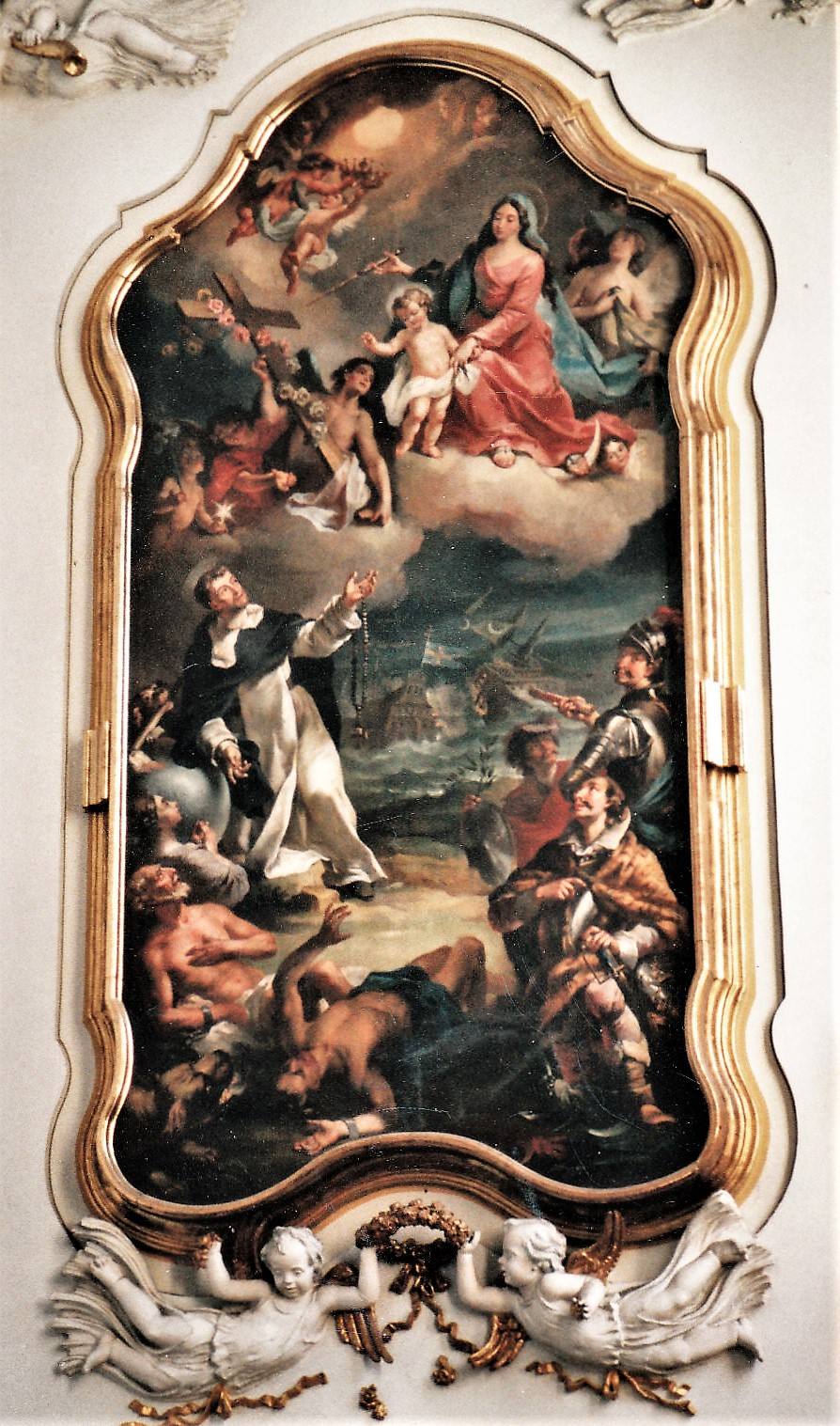 Augustinerkirche (Würzburg) - Hochaltarbild: Der hl. Dominikus mit Rosenkranz, im Hintergrund die Seeschlacht von Lepanto, über den Wolken Maria mit Kind